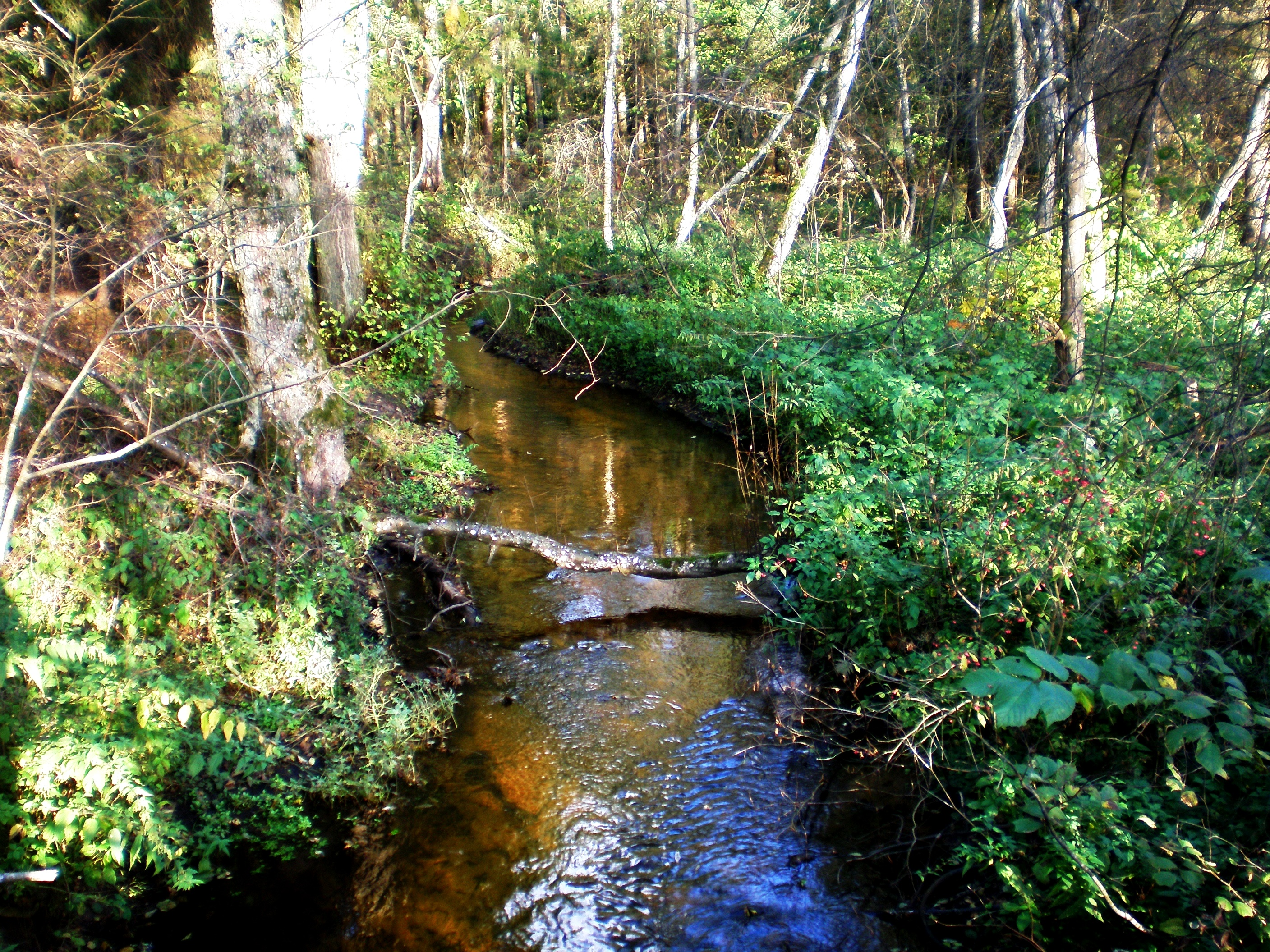 Veržuvos upelis ties Veržuva, Vilnius